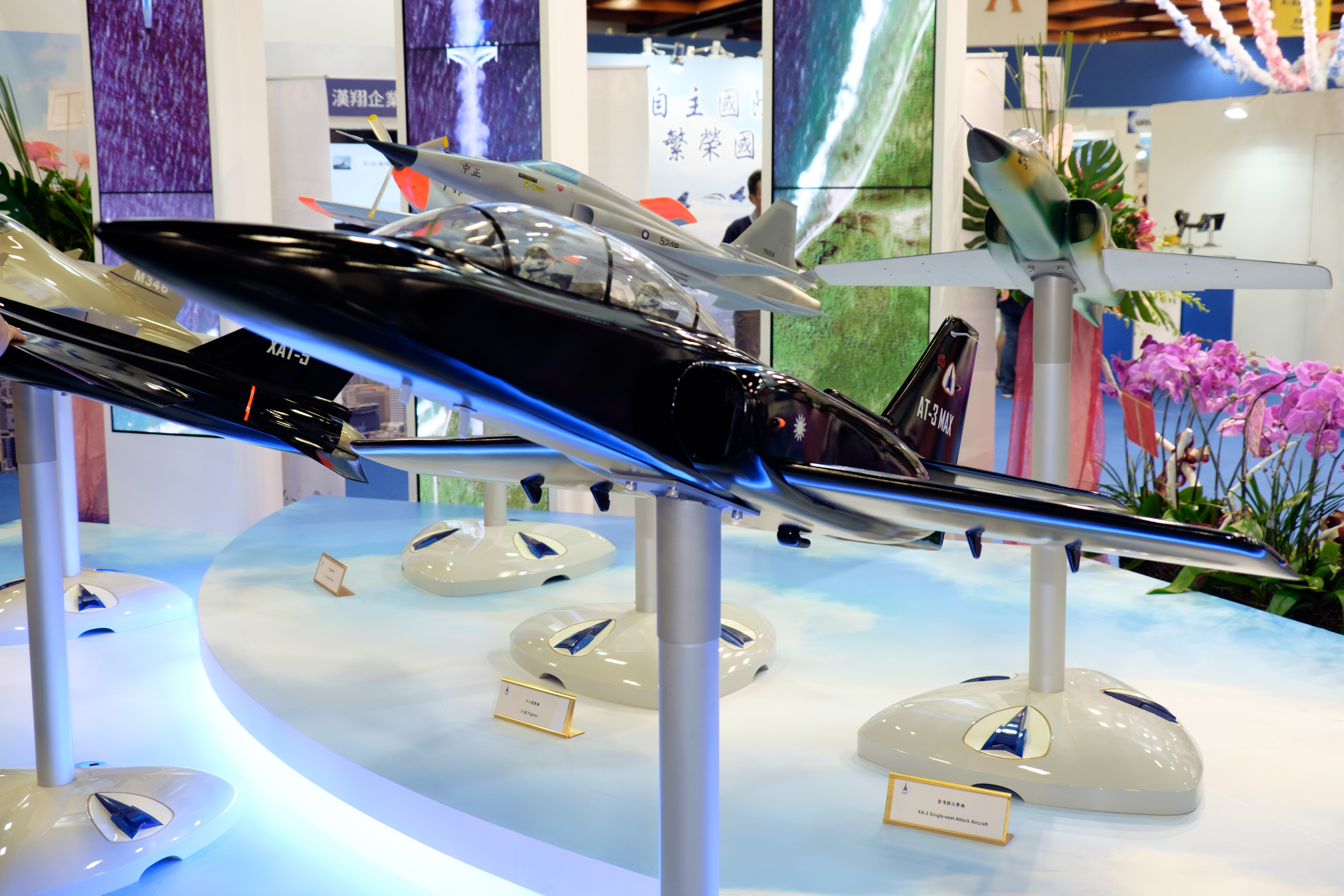 中文（台灣）: 2015台北國際航太暨國防工業展覽會，漢翔航空工業攤位展示，由AT-3教練機升級發展的高級教練機AT-3 MAX模型，預定未來競標中華民國空軍次世代高級教練機的方案之一。